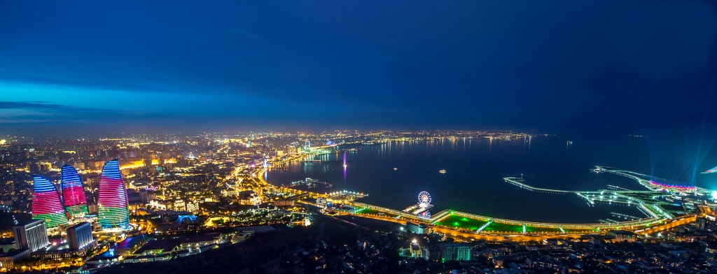 Bakü gece görünüşü